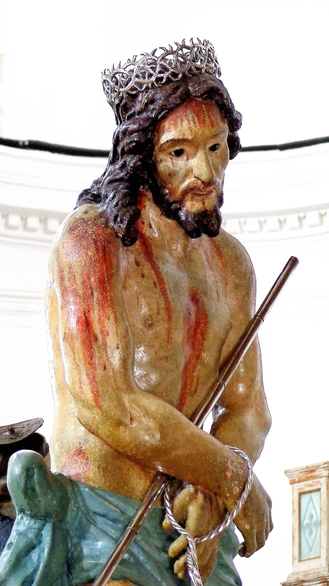 Ecce Homo, dettaglio